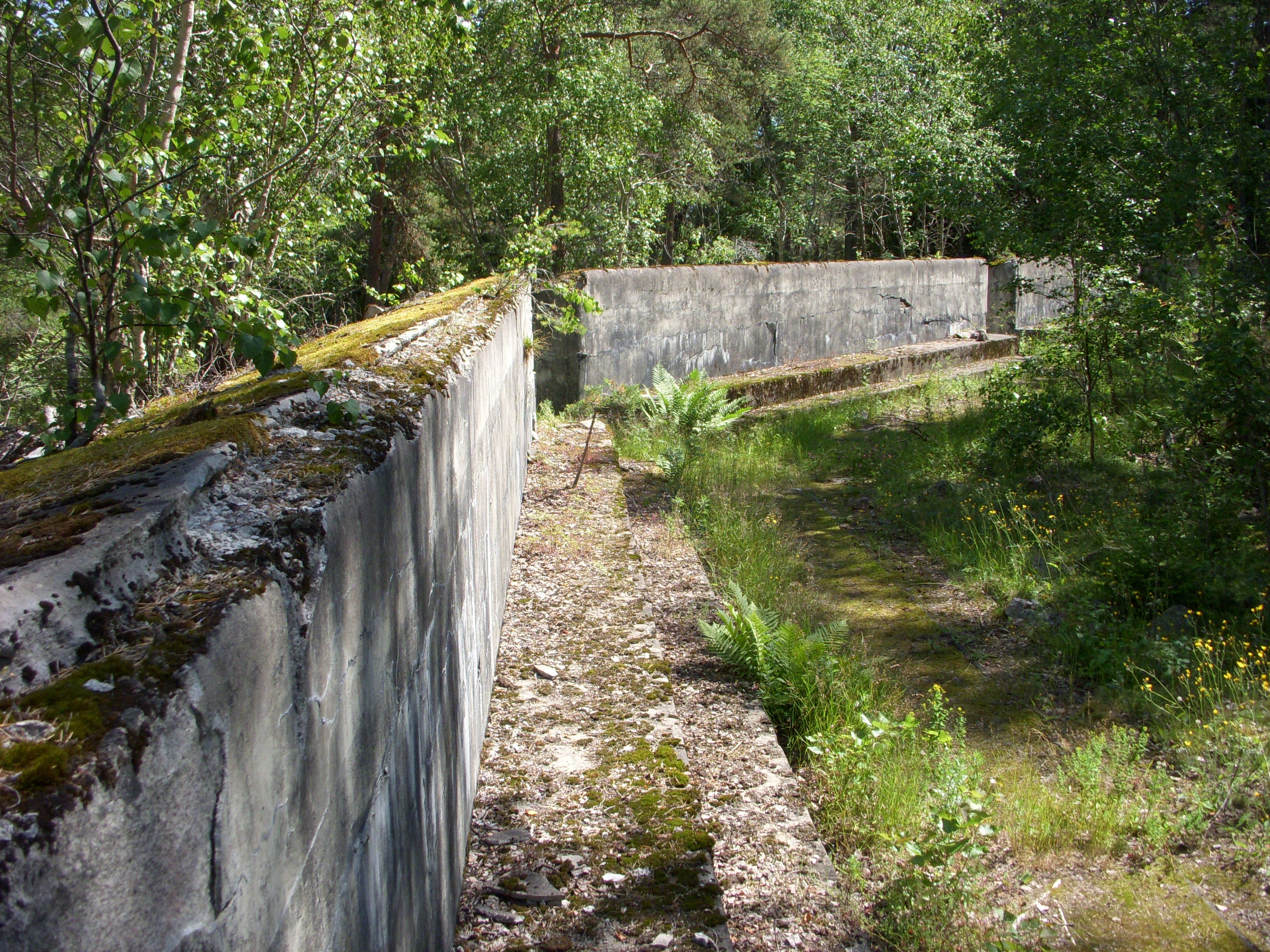 Värmdölinjen, batteri nr 4, skyttevärn